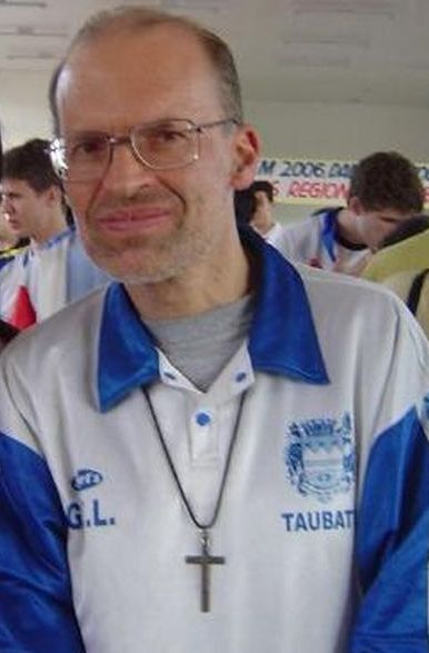 Image:Mequinho2.JPG remix